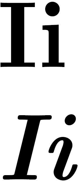 Latin letter I